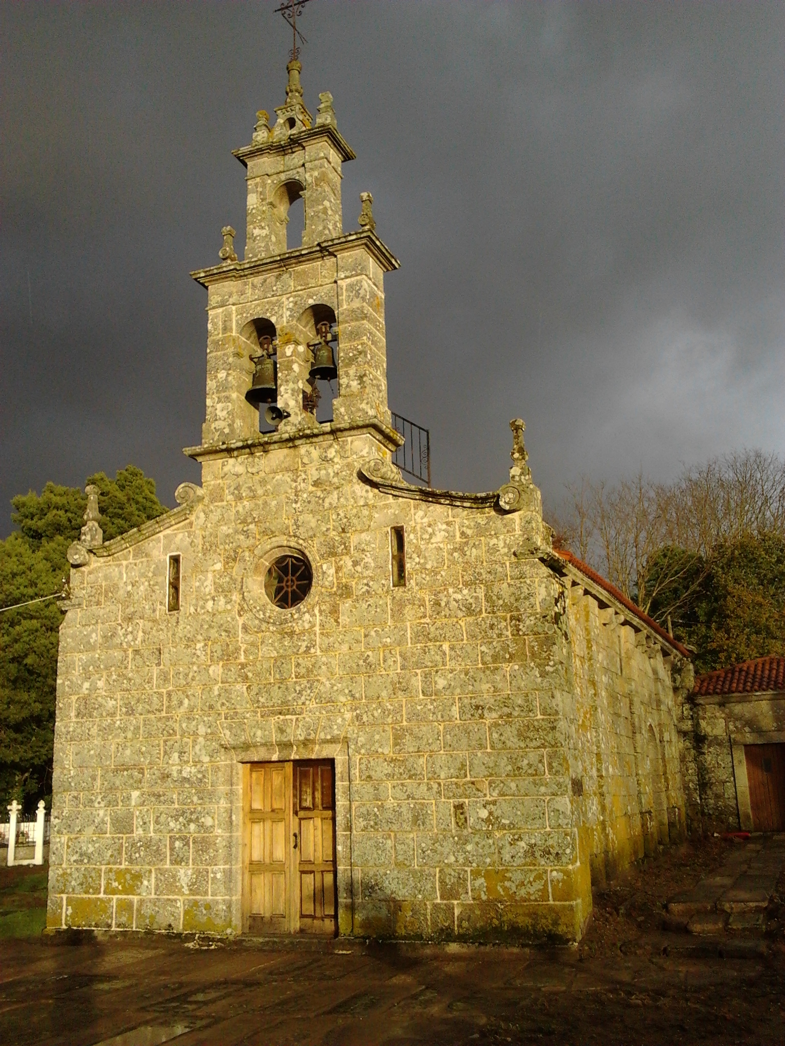 Igrexa parroquial de Santa María de Ois, concello de Coirós